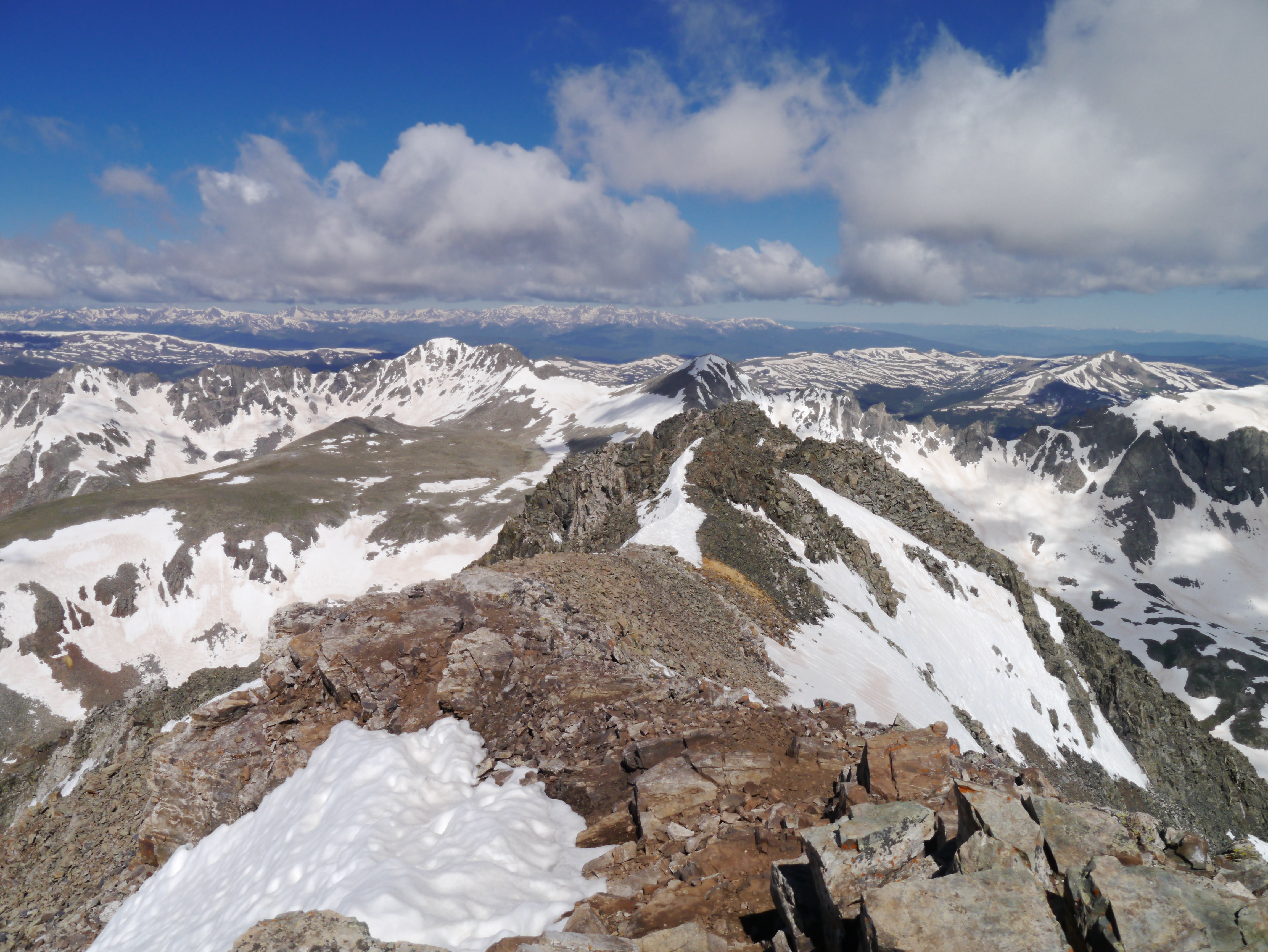 Quandary Peak, Colorado, USA